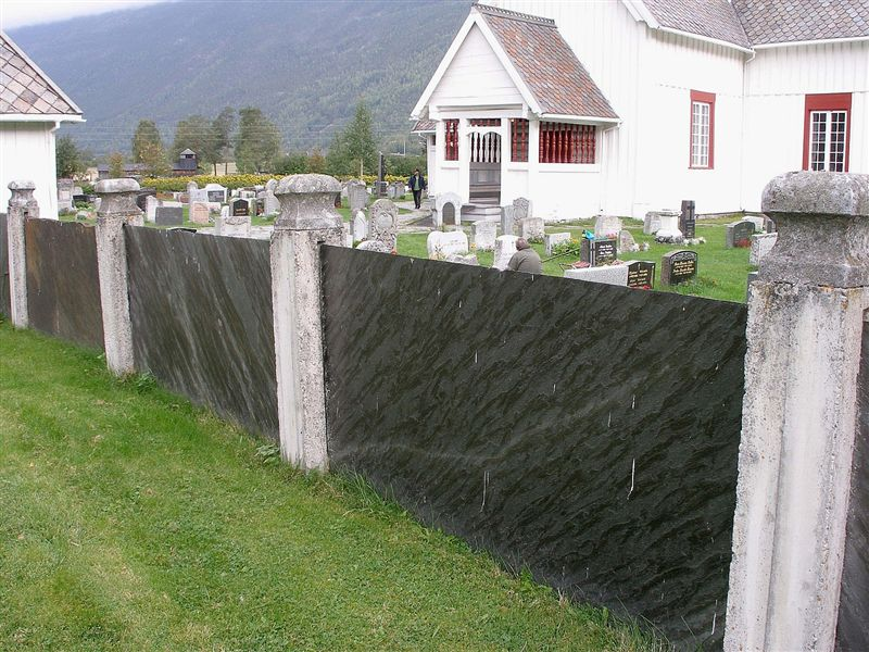 Sel kirke i Oppland.